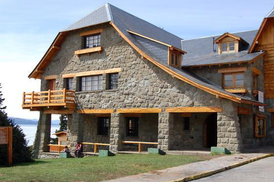 Biblioteca Popular "Domingo Faustino Sarmiento", ubicada en el noreste del Centro Cívicode la ciudad de San Carlos de Bariloche, Argentina.